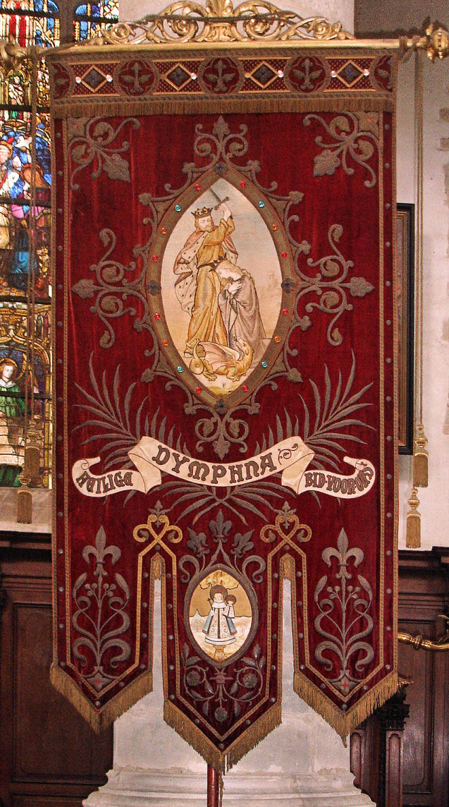 Religieus textiel Antwerpen